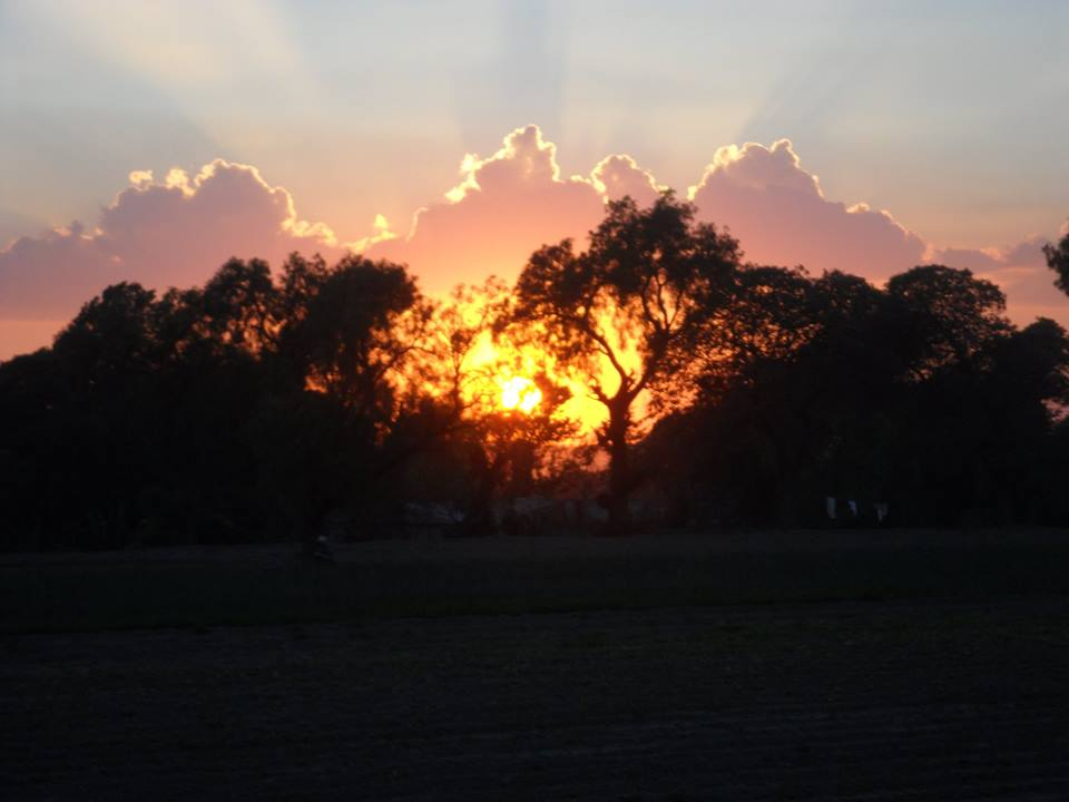 Ocaso o atardecer otoñal en los campos de Palmarito Tochapán. Fotografía Jeshua Geraldi © D.R.